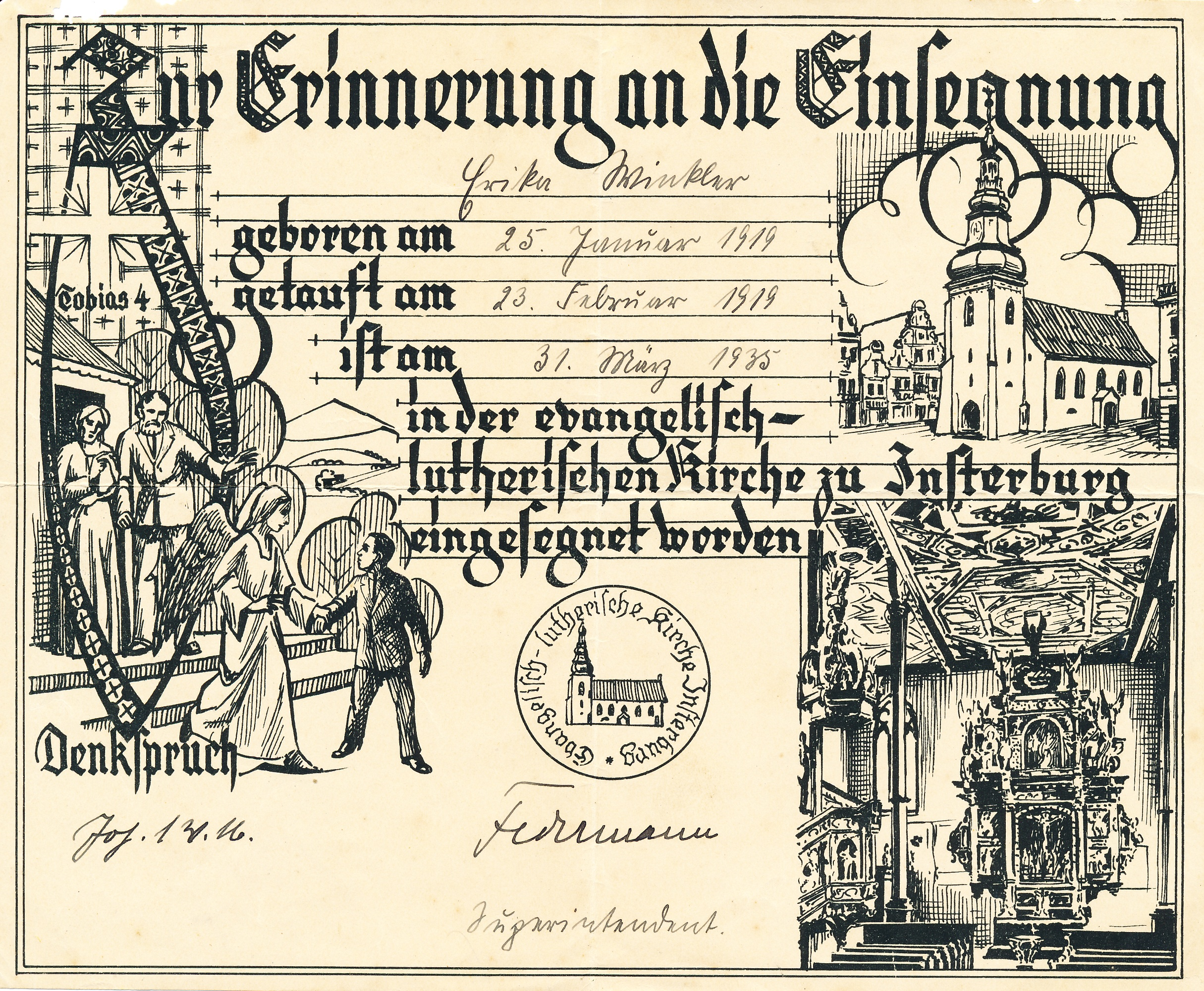 Lutherkirche Insterburg Einsegnungsurkunde 31. März 1935 Erika Winkler (* 25.01.1919 in Grünheide, Kreis Insterburg; † 27.07.1945 in Rosa, Bezirk Tscheljabinsk, Sowjetunion) Superintendent Hermann Federmann